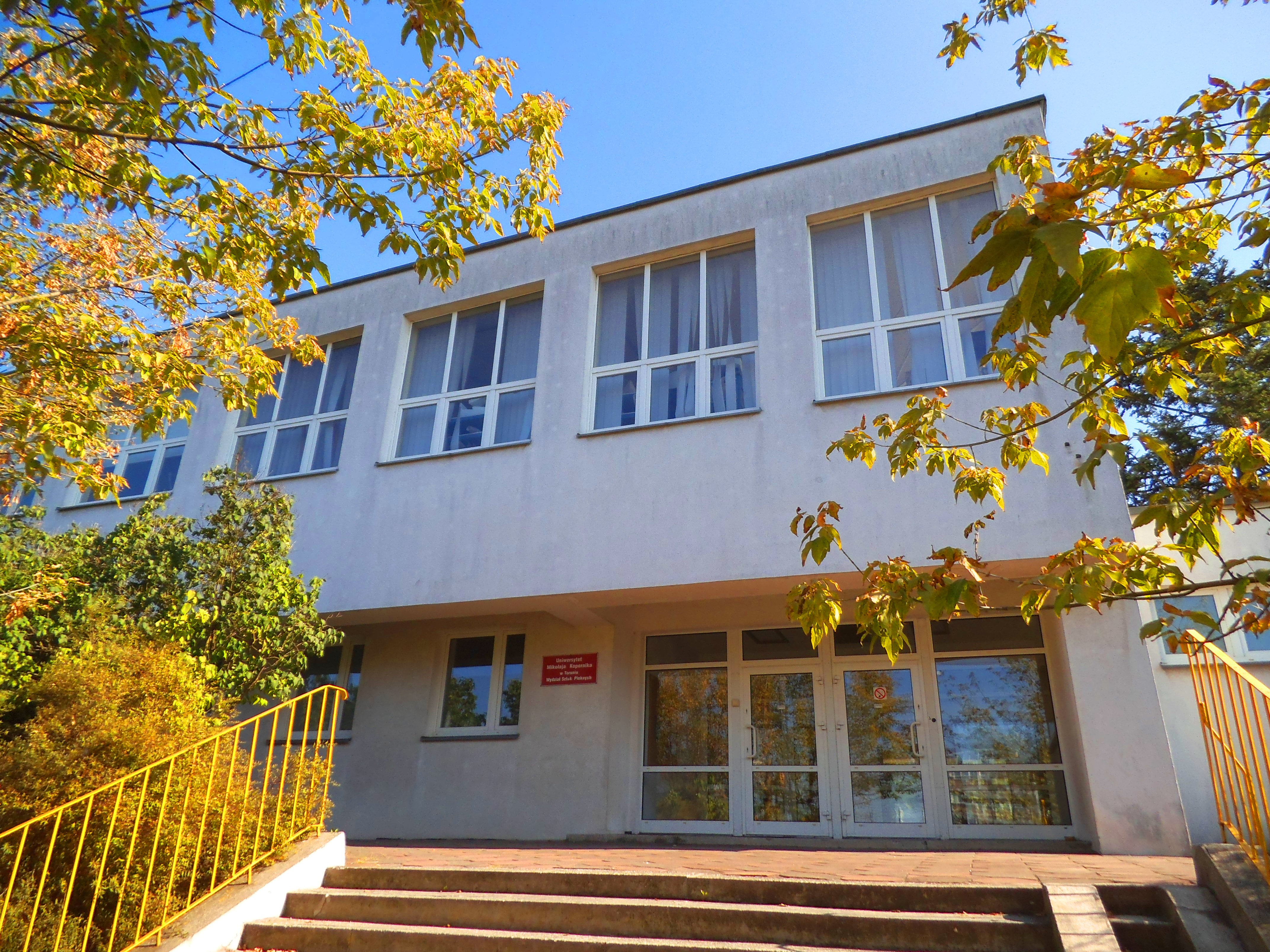 Zakład Rysunku Wydziału Sztuk Pięknych w Toruniu